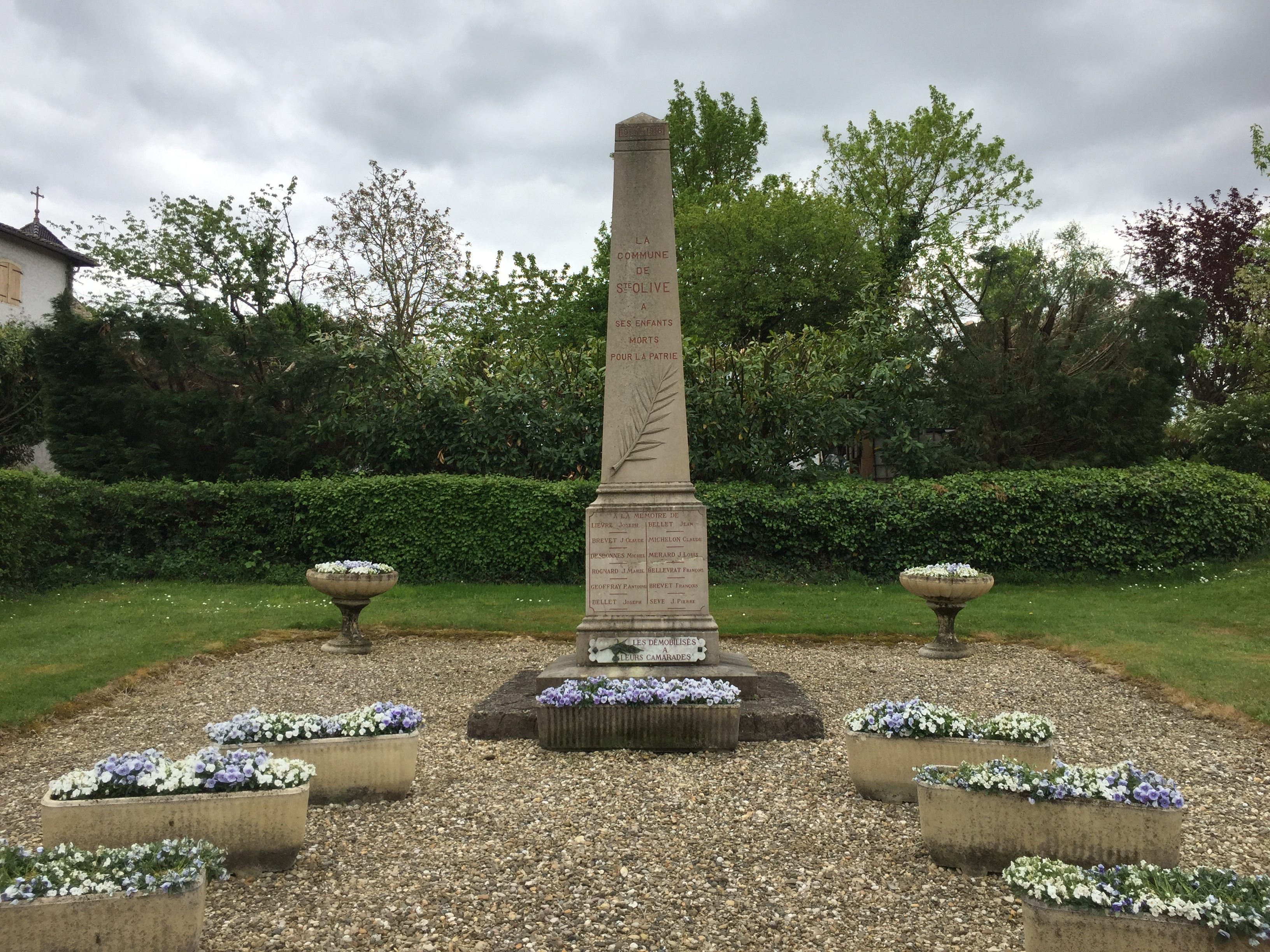 Image du village de Sainte-Olive, dans l'Ain, en France.